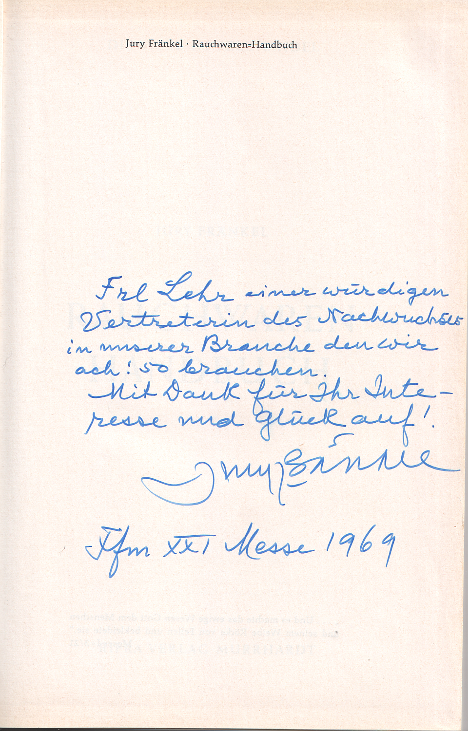 Jury Fränkel: Rauchwarenhandbuch. Die Tiere im Pelzhandel. Schutzumschlag (Pixelvergrößerung des Eskimosteindrucks, sowie unscharf, wegen evtl. Urheberrecht). Widmung: Frl Lehr einer würdigen Vertreterin des Nachwuchses in unserer Branche den wir ach! so brauchen. Mit Dank für Ihr Interesse und Glück auf! Jury Fränkel. Ffm XXI Messe 1969. Rifra Verlag Nürnberg, 2. Auflage, Deutsche Ausgabe. Copyright Jury Fränkel, Paris, Rue Massenet 14. Rifra Verlag, Murrhardt 248 Seiten, Hardcover, Schutzumschlag, 14,5 x 21,5 cm.